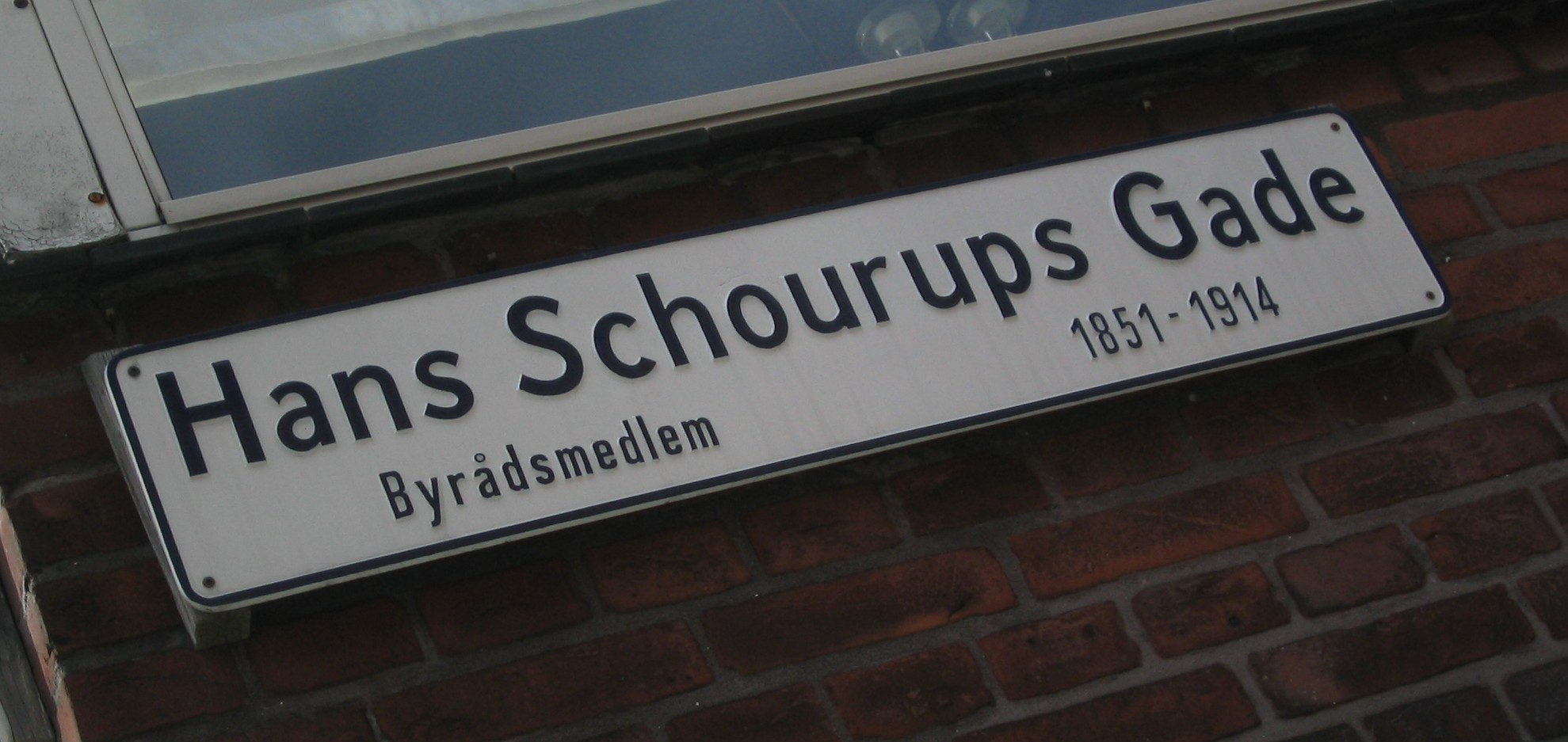 Street Sign, Hans Schourups Gade, Århus, Denmark